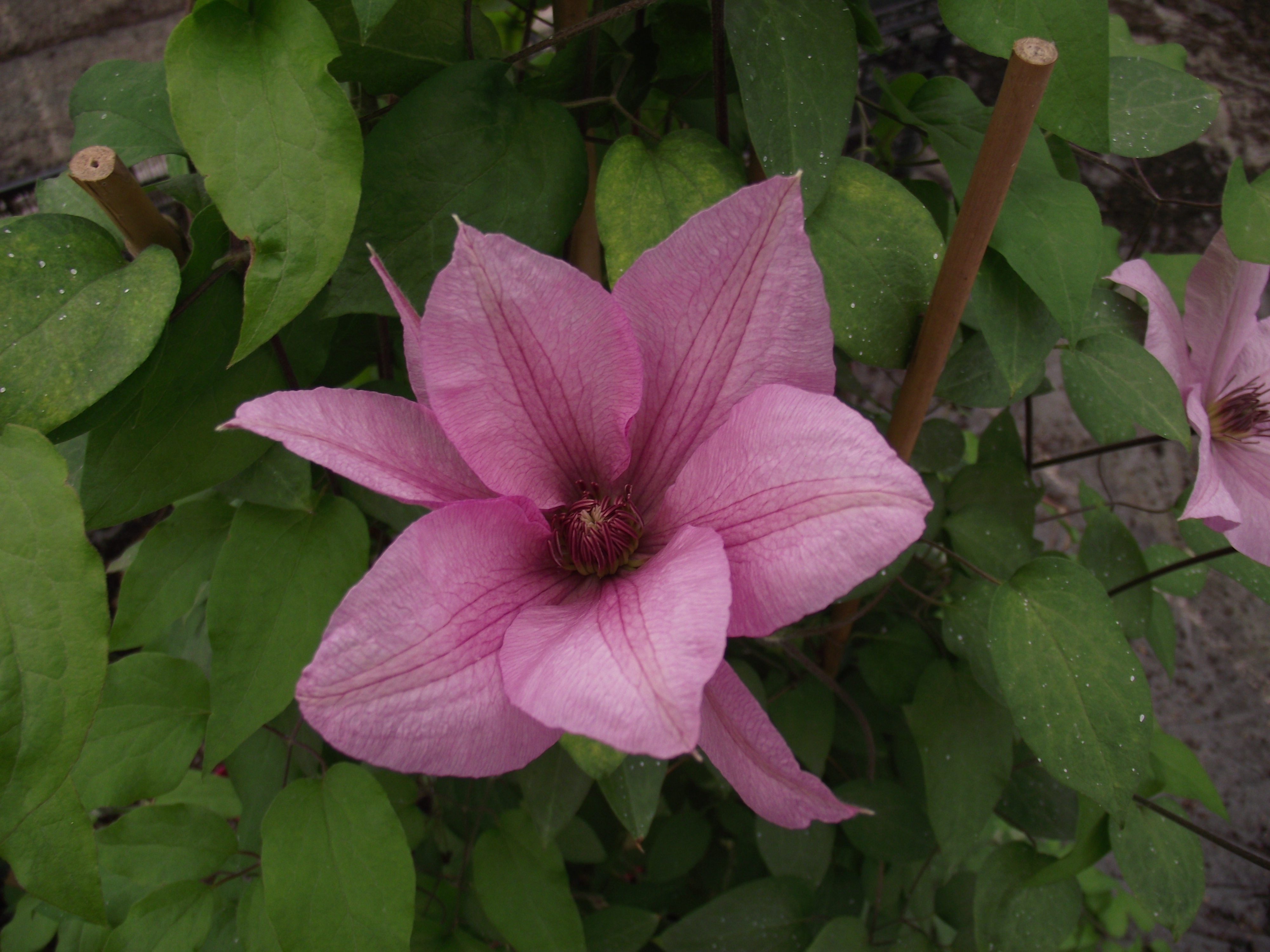 Clematite Patens Summerdream ‘Zosumdre’ PBR